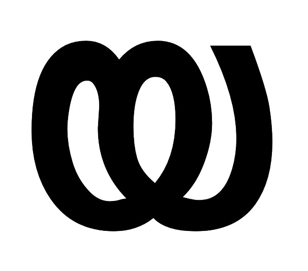 യ മലയാളം അക്ഷരം